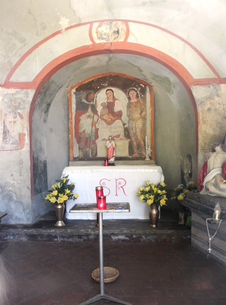 Interno dell'oratorio di San Rocco a Bertonico.